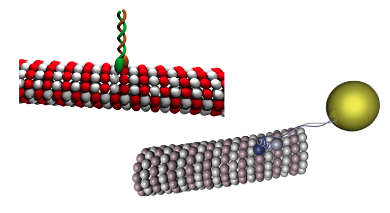 über die Motordomäne bewegt sich das Motorprotein in Richtung Synapse; Vehikel befinden sich an der Schwanzdomäne